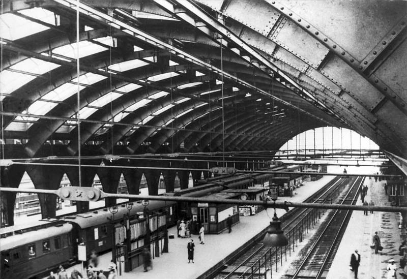 Berlin, Schlesischer Bahnhof ADN-ZB-Archiv Berlin 1937 Blick in die neuerbaute Halle des Schlesischen Bahnhofs (später Ostbahnhof) [Scherl Bilderdienst]